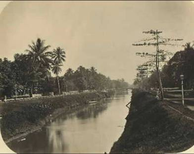 Gunung Sahari Tempo Dulu